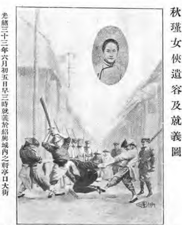 治家全書圖像